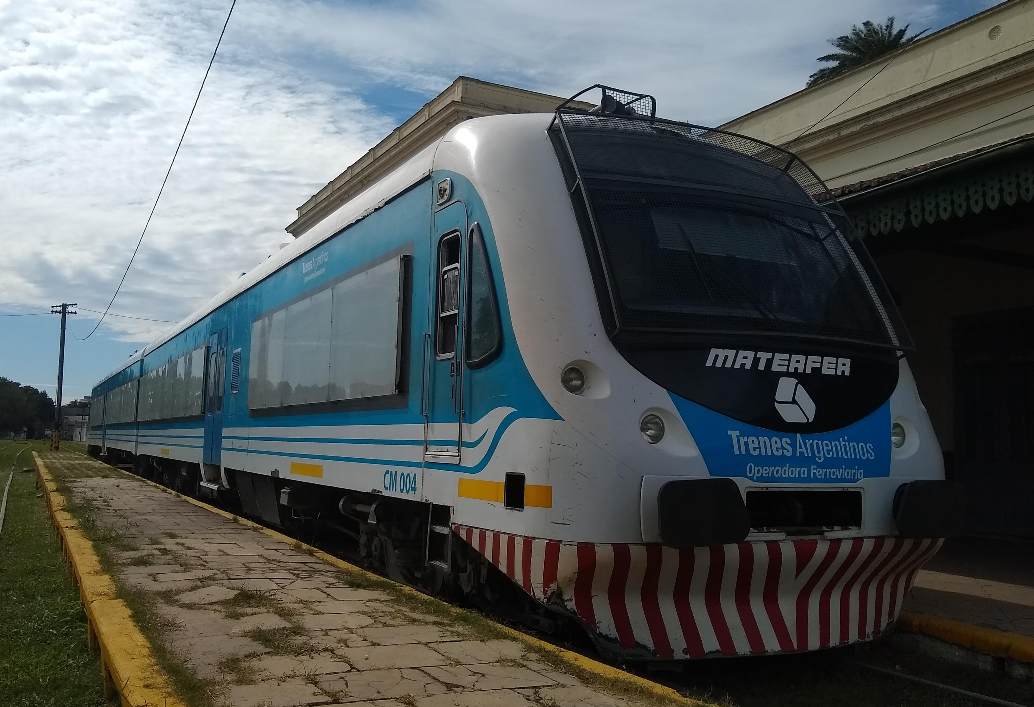 Tren urbano de la ciudad de Paraná, ER, Argentina. Fabricado por Materfer.